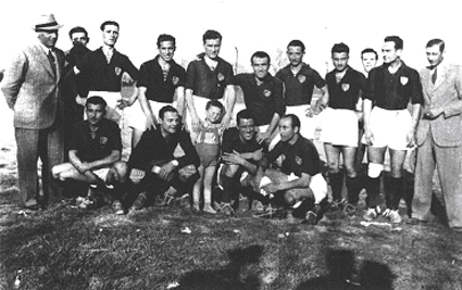 Il Narni vincitore del campionato di 1° Divisione Umbra 1939-40 - In alto da sin: Modoni (Pres), Braciola, Garibaldi, Pauselli, Cabiati A., Sparisci, Proietti E., Baldistei, Pacini (Mass), Pascucci, Ciarletti (All.). In basso da sin.: Agostini, Franceschini, Cabiati G. (Mascotte), Cabiati F., Pasqualini.